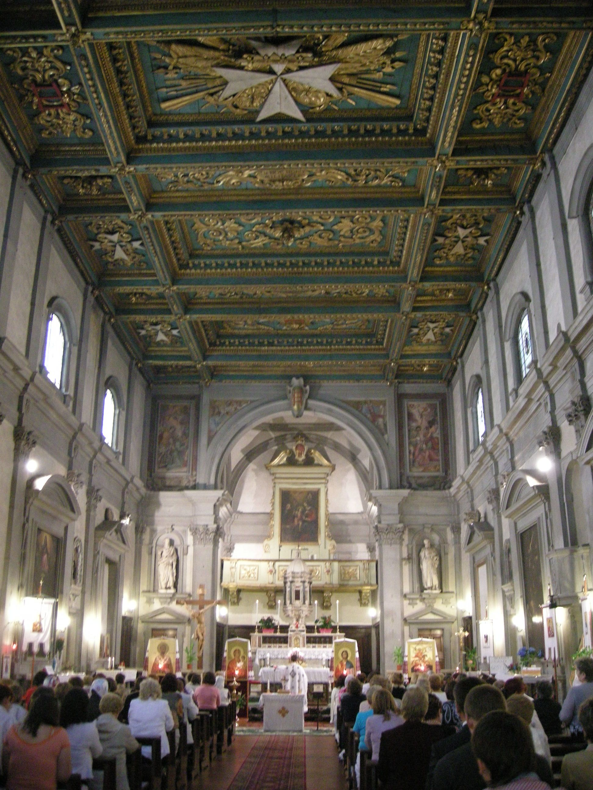 Chiesa dei santi simone e giuda, interno